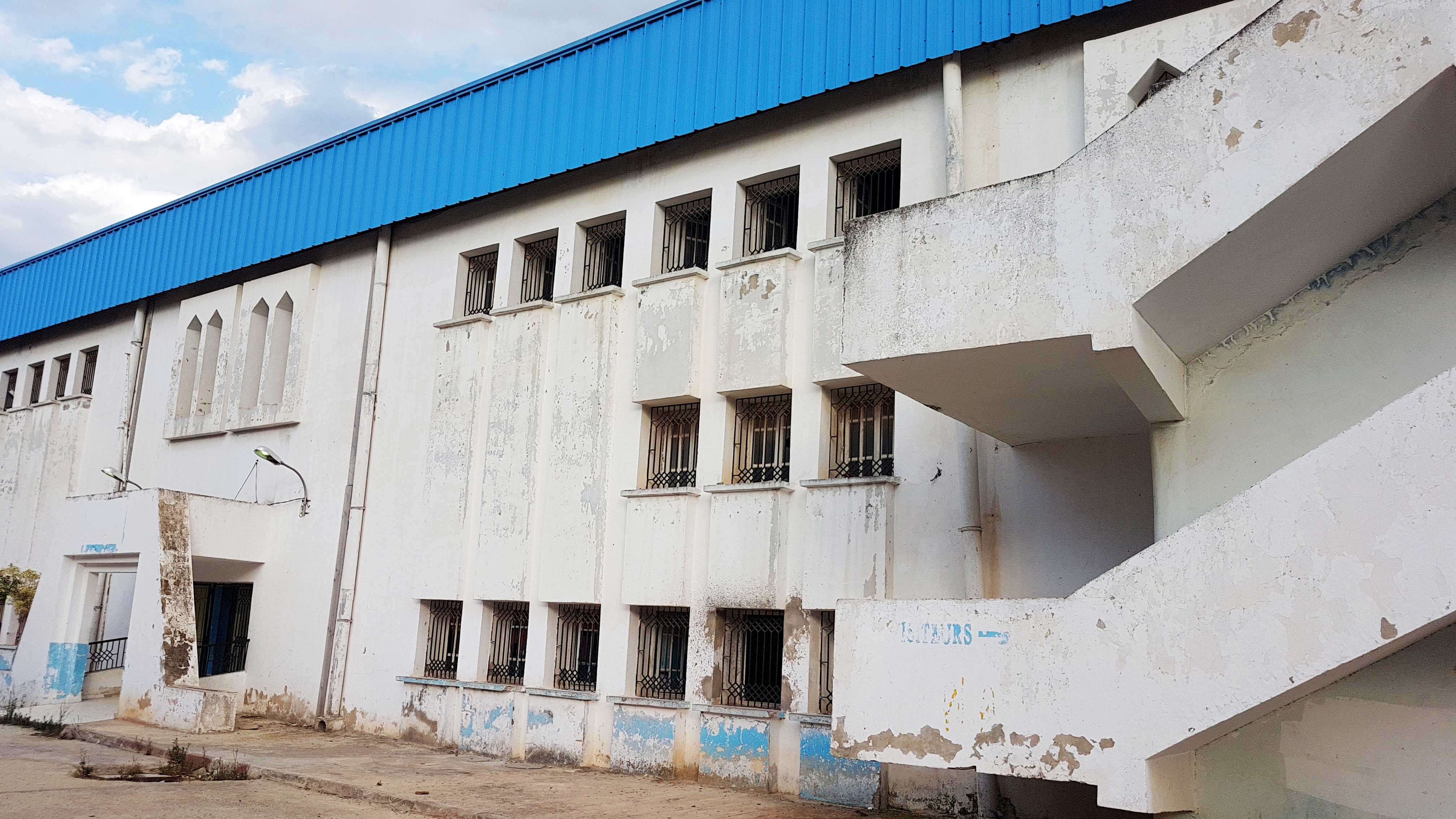 Salle de sport cite ettadhamen